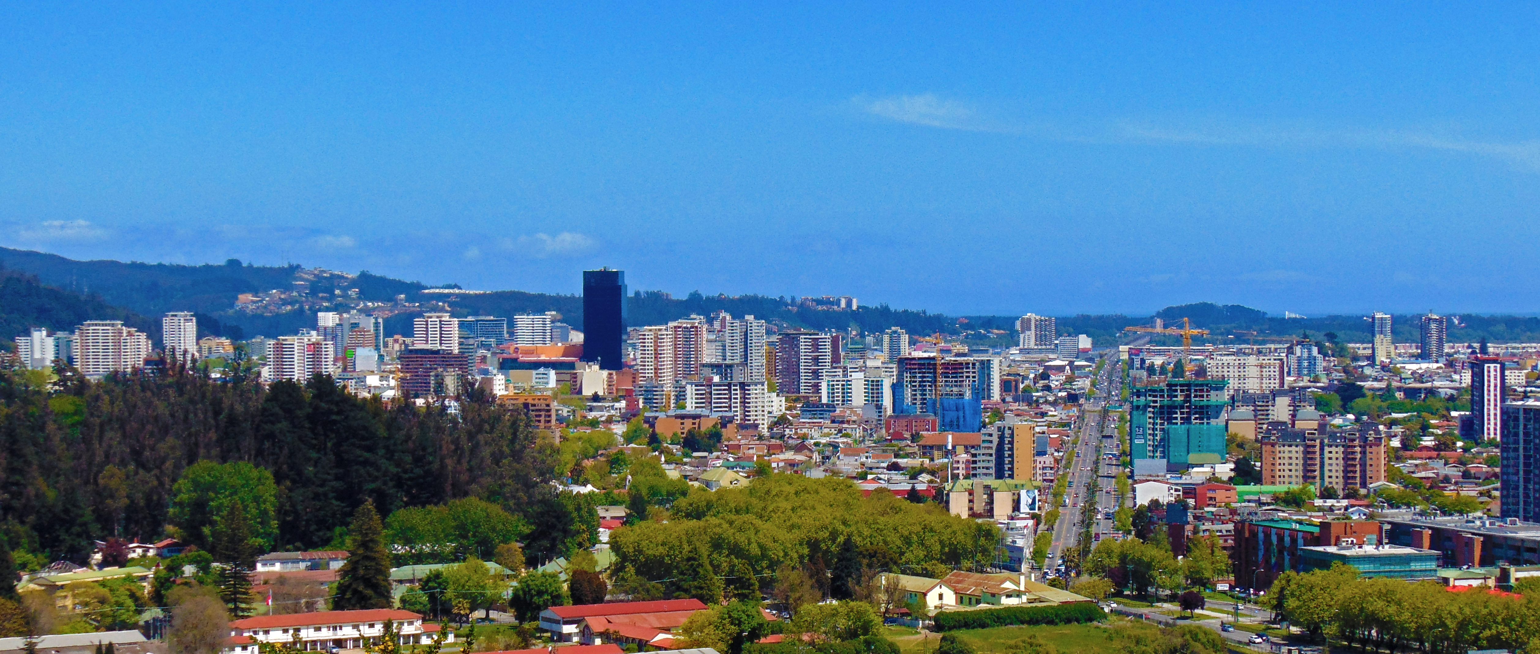 Vista de la ciudad de Concepcion desde el norte